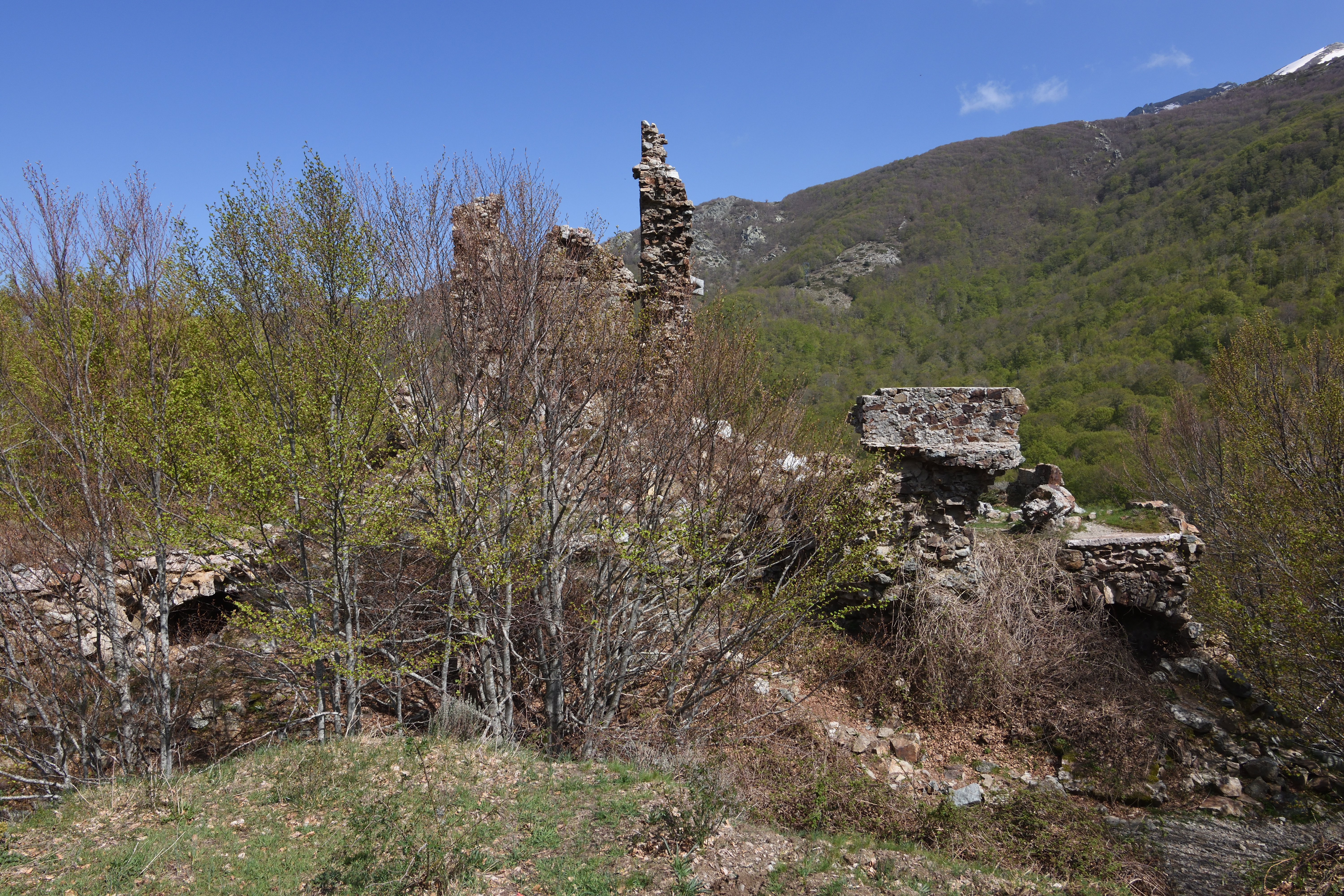 Ruines du Fort de Vaux au dessus du col de Vizzavona en Corse